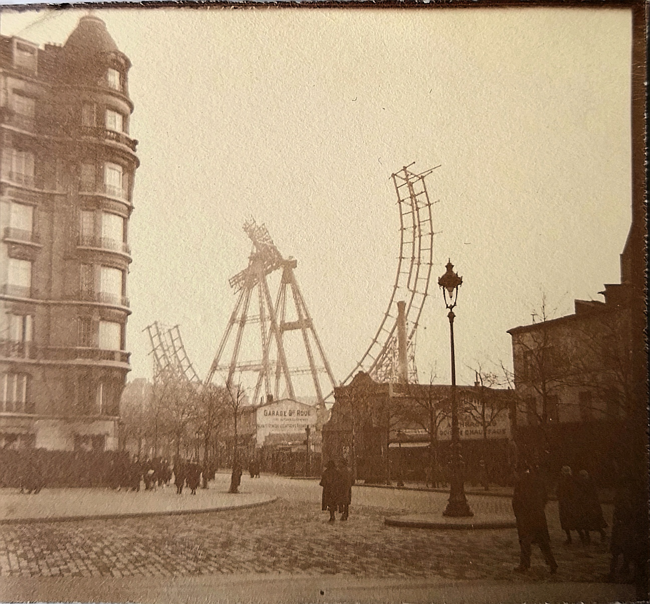 Demolition de la Grande Roue en Février 1922